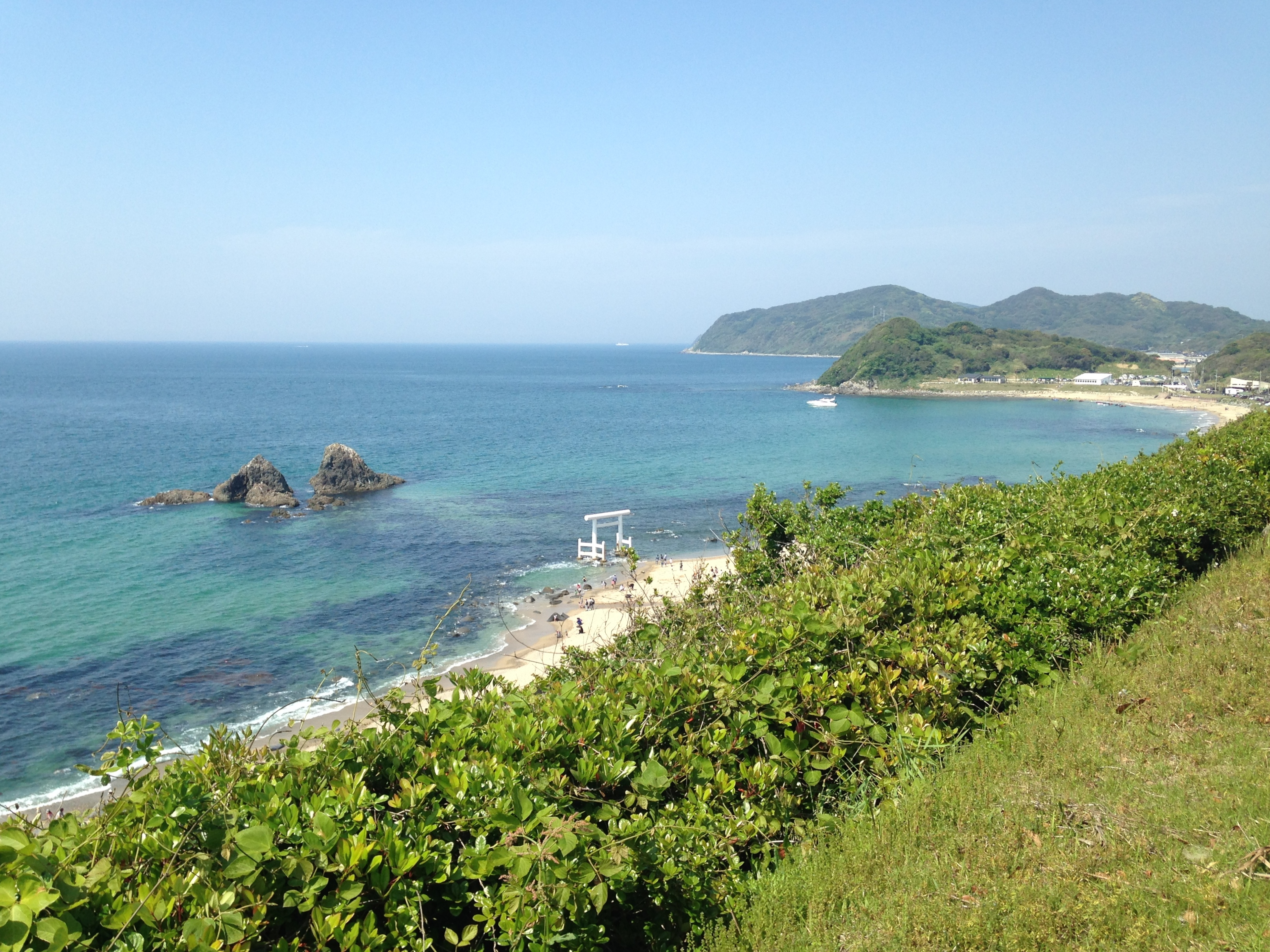 二見ヶ浦公園聖地の展望台より望む二見ヶ浦